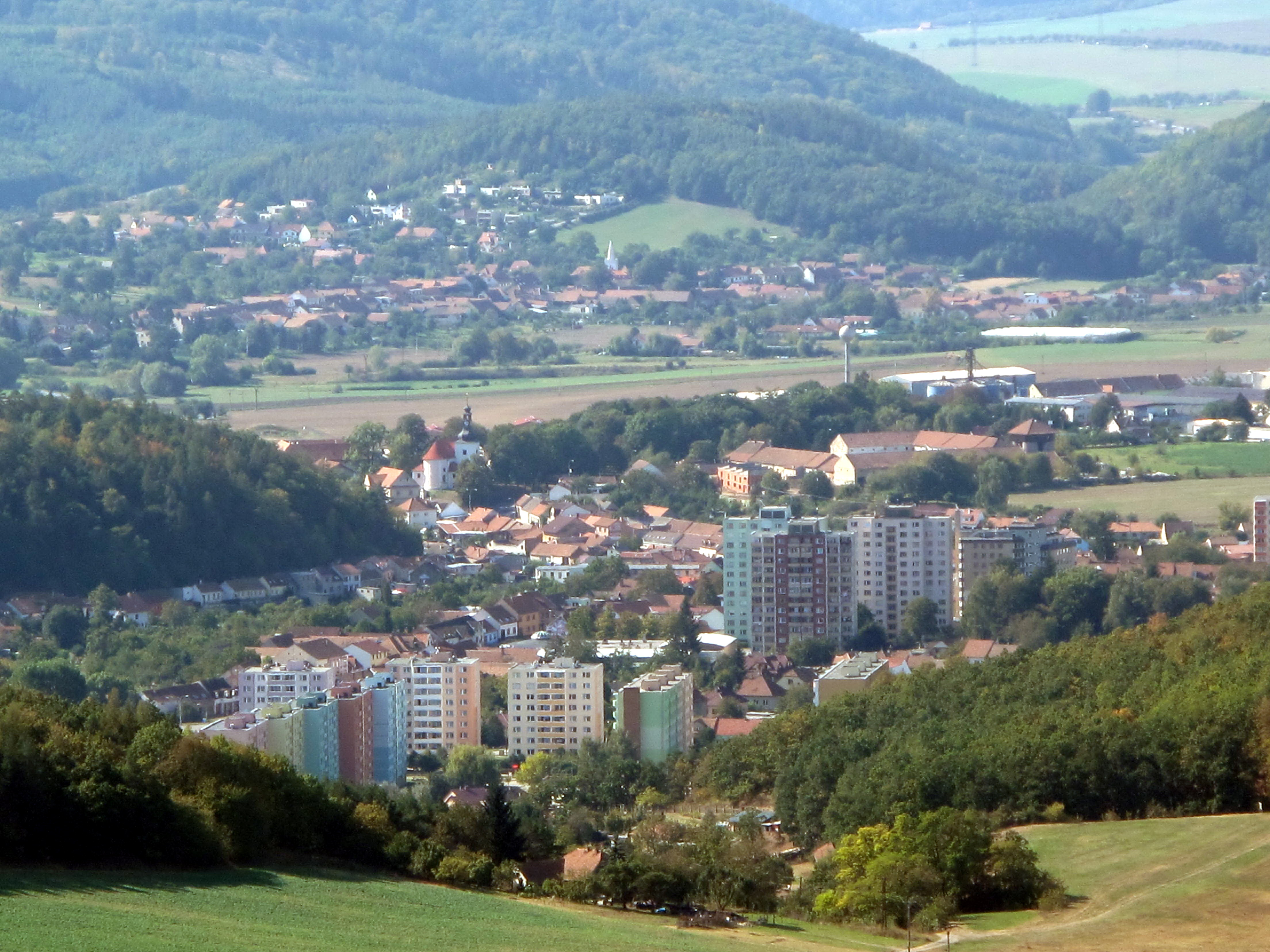 Výhled z rozhledny Babí lom